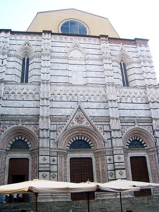 Siena - Battistero